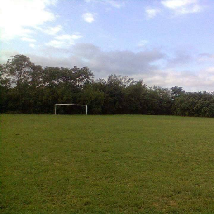 Терен за играње фудбала у селу Ландол